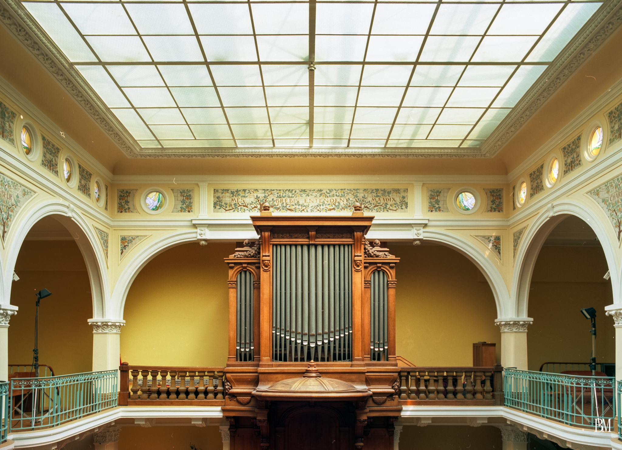 Temple protestant du Foyer de l'Âme, Paris, France.